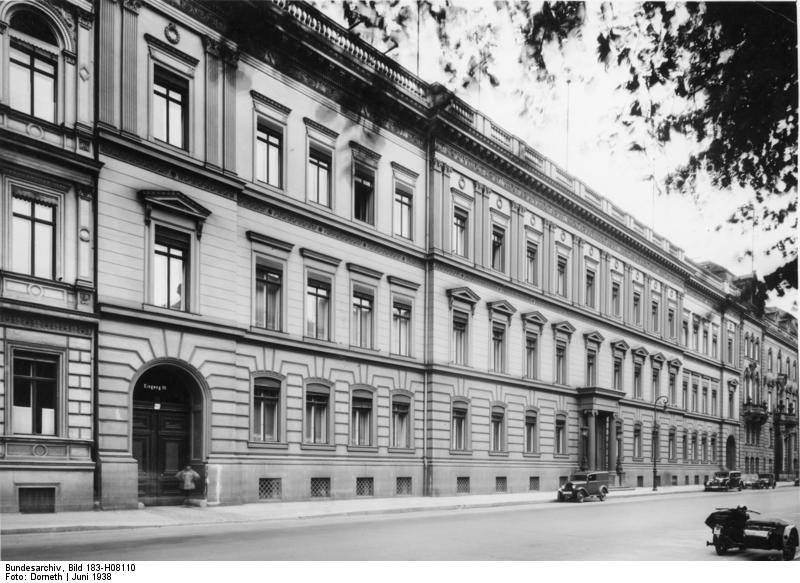 ADN-ZB/Archiv Berlin: Juni 1938 Das Preußische Justizministerium in der Wilhelmstraße Nr. 65 (später Otto-Grotewohl-Str.) Aufnahme: Dorneth [Scherl Bilderdienst]